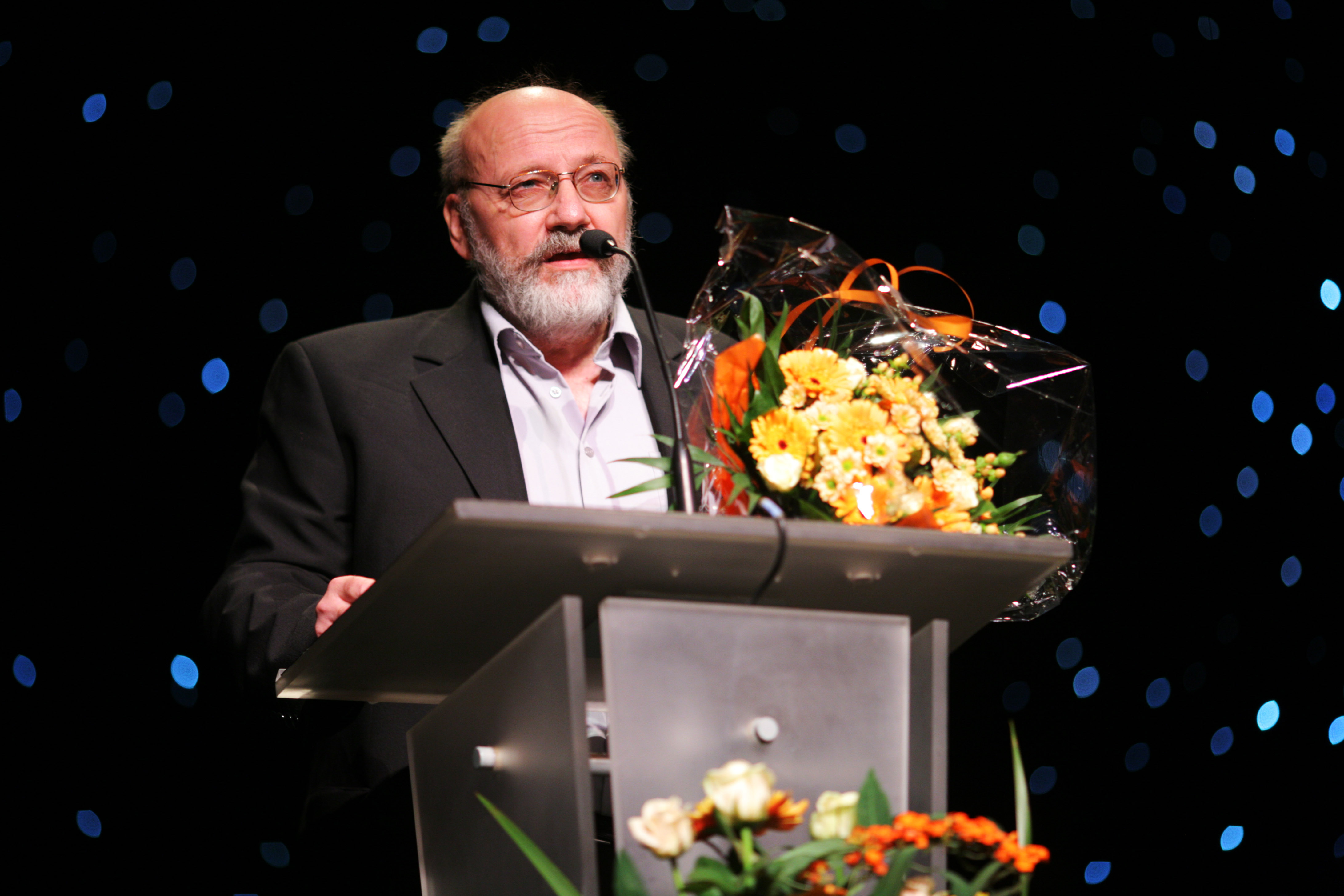 Bogi Hansen, vinnare av Nordisk rådets miljöpris 2006